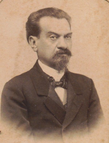 Joaquim Manuel Rodrigues Lima (Caetité, 4 de maio de 1845 — 18 de dezembro de 1903) foi um político brasileiro, primeiro governador eleito da Bahia.